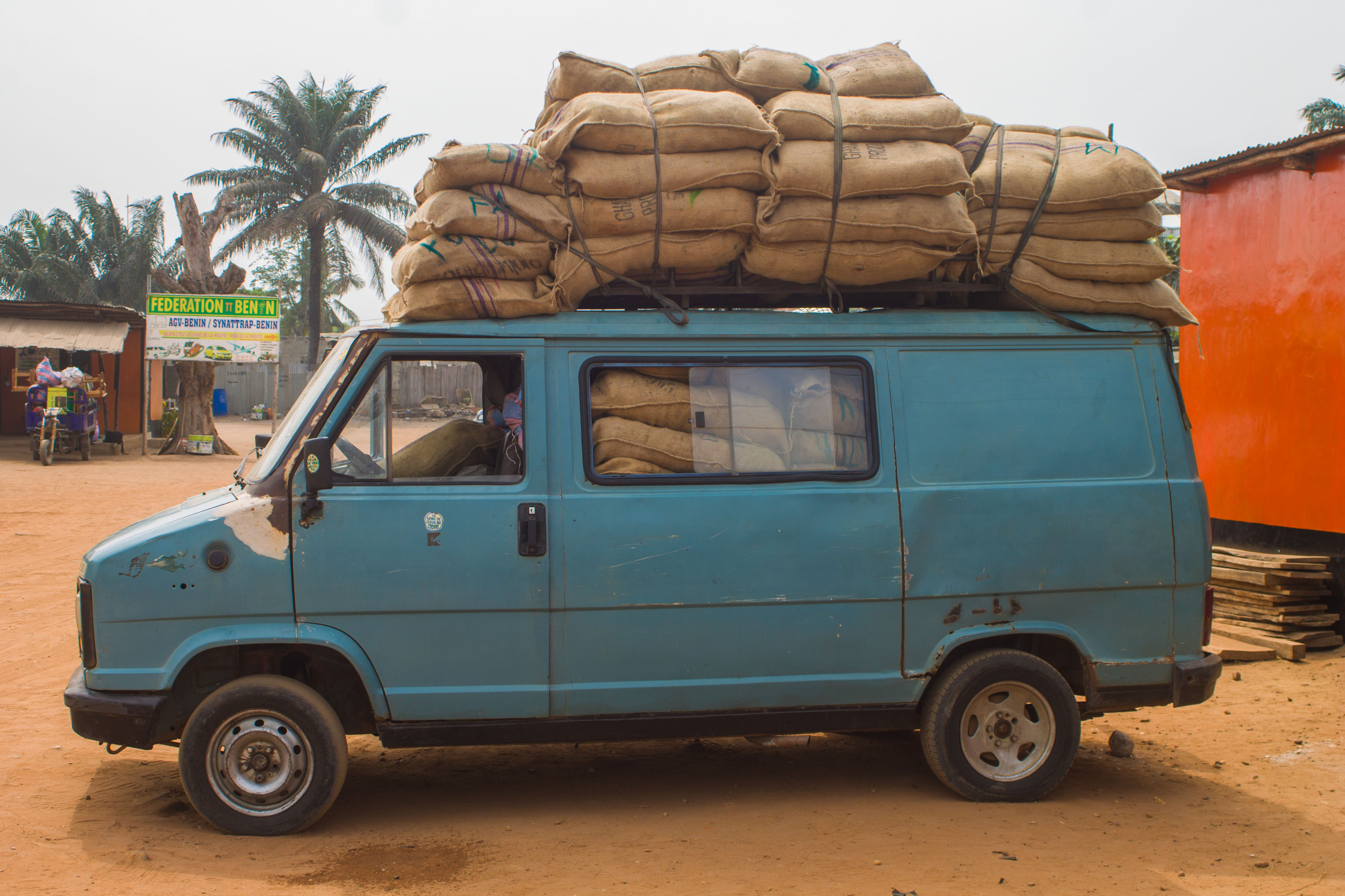 chargement pour bohicon This is an image with the theme "Africa on the Move or Transport" from: Benin